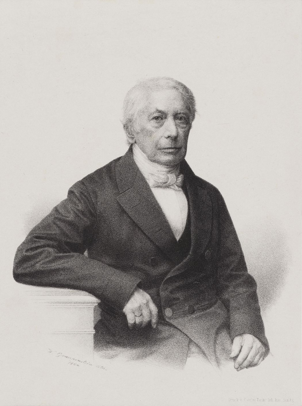 Porträt Martin Hieronymus Hudtwalcker von Friedrich Wilhelm Graupenstein